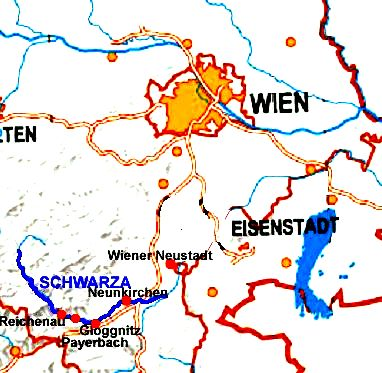 selber abgezeichnet